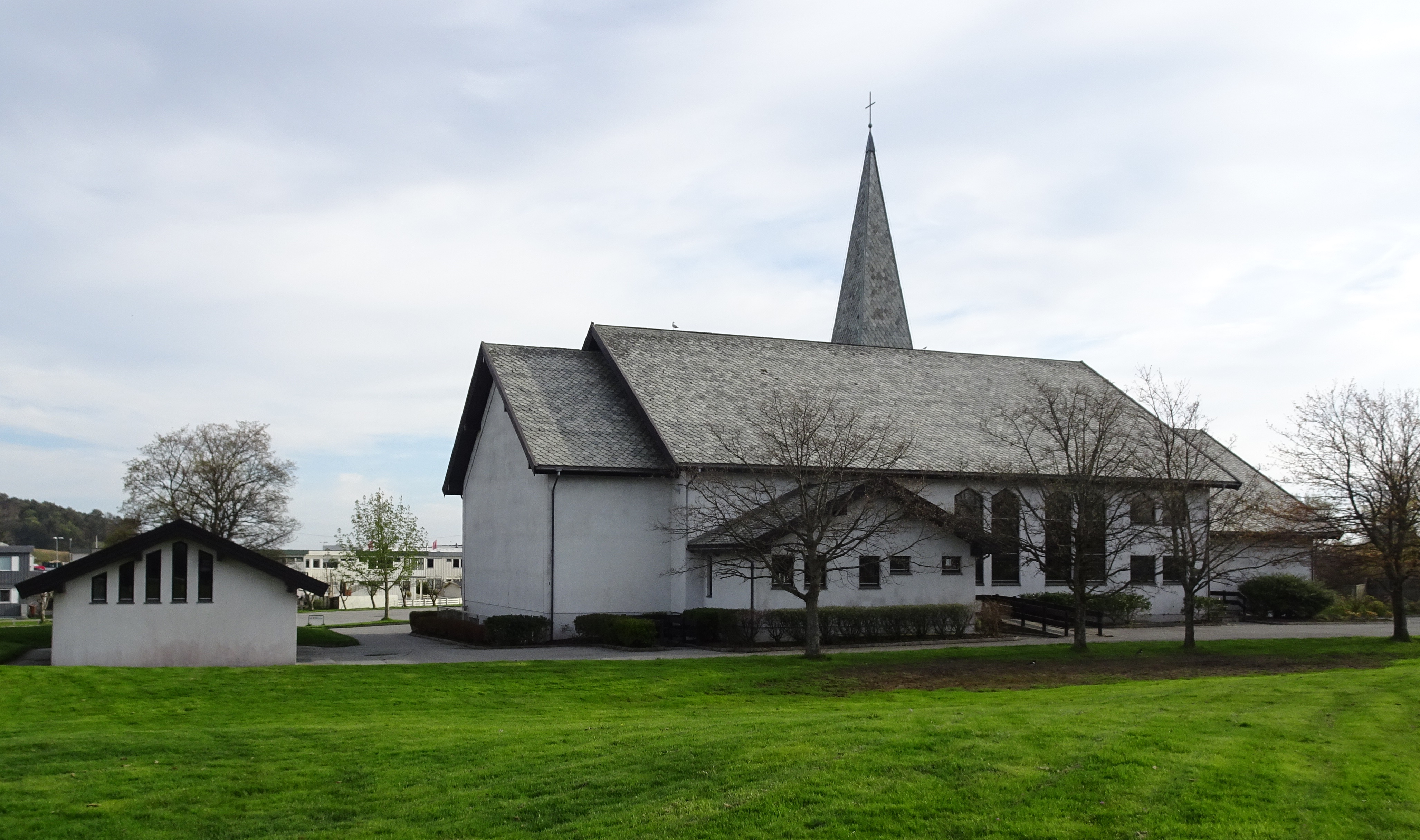 Norheim kirke